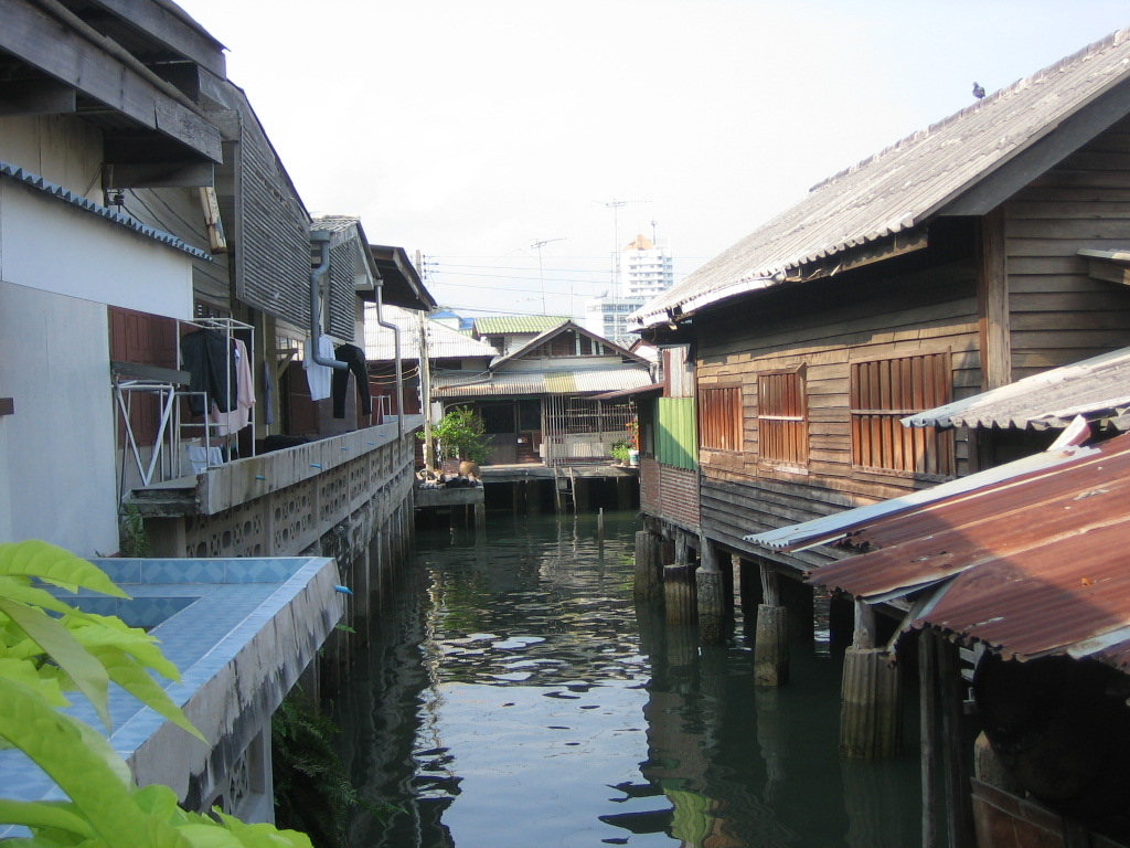 Wohnhäuser auf Pfählen im Hafen von Si Ratcha